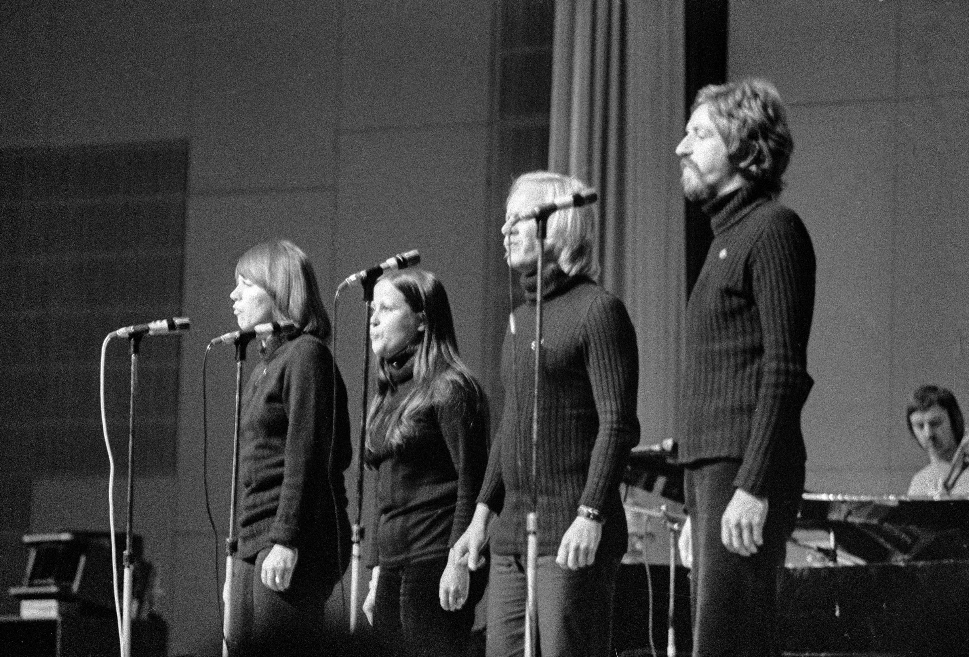 Lauluyhtye Agit Prop esiintymässä Chile-solidaarisuuskonsertissa Messuhallissa Töölössä Helsingissä 12. lokakuuta 1974.